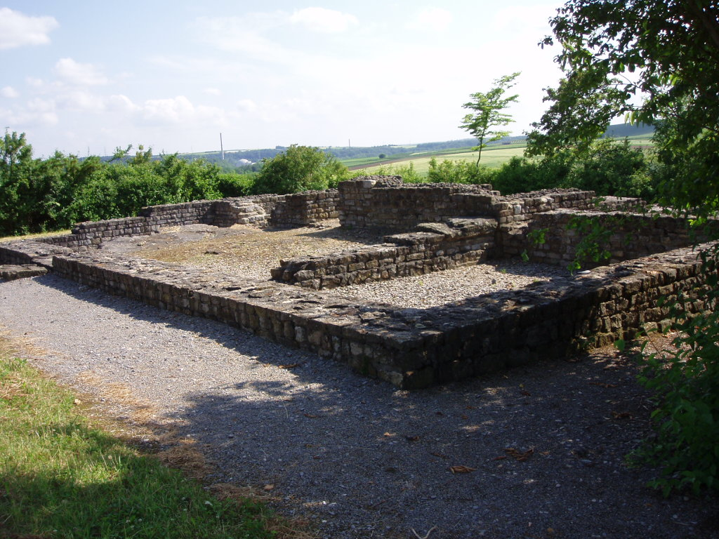 Villa rustica Lauffen, älteres Wohngebäude